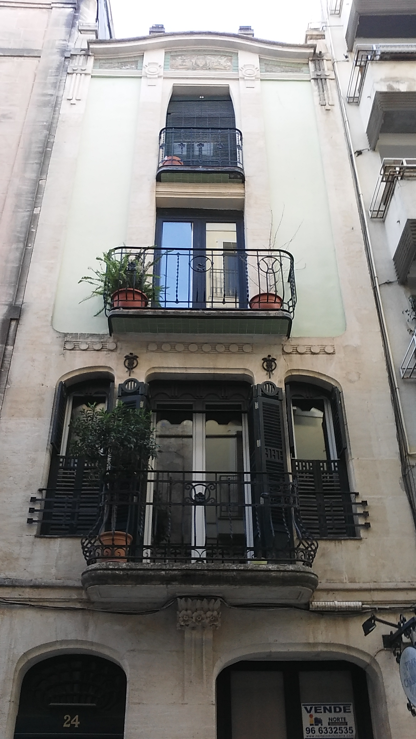 Casa particular de Timoteo Briet Montaud en Carrer Sant Josep número 24 d'Alcoy (Alacant).